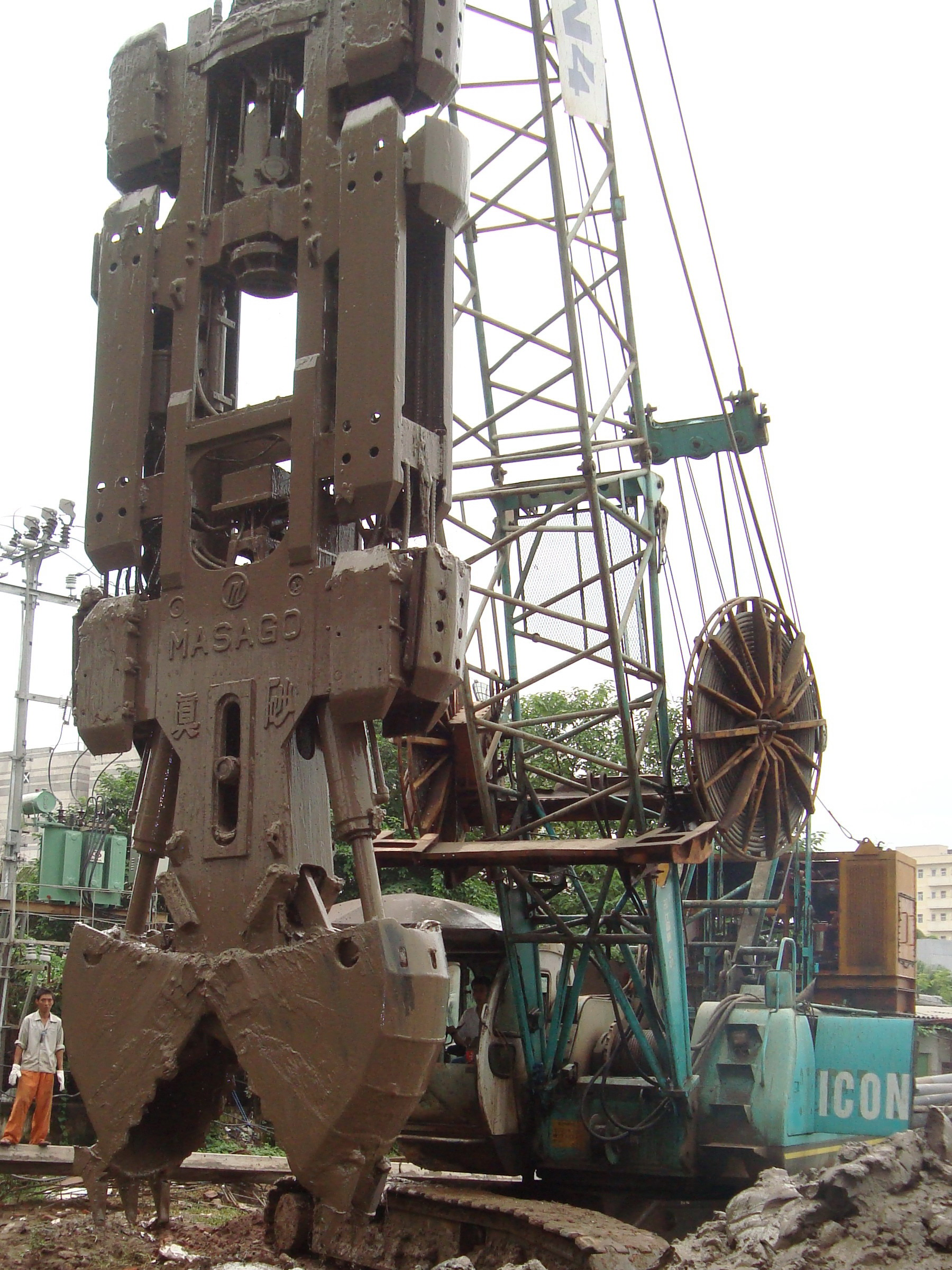 Hình tự chụp